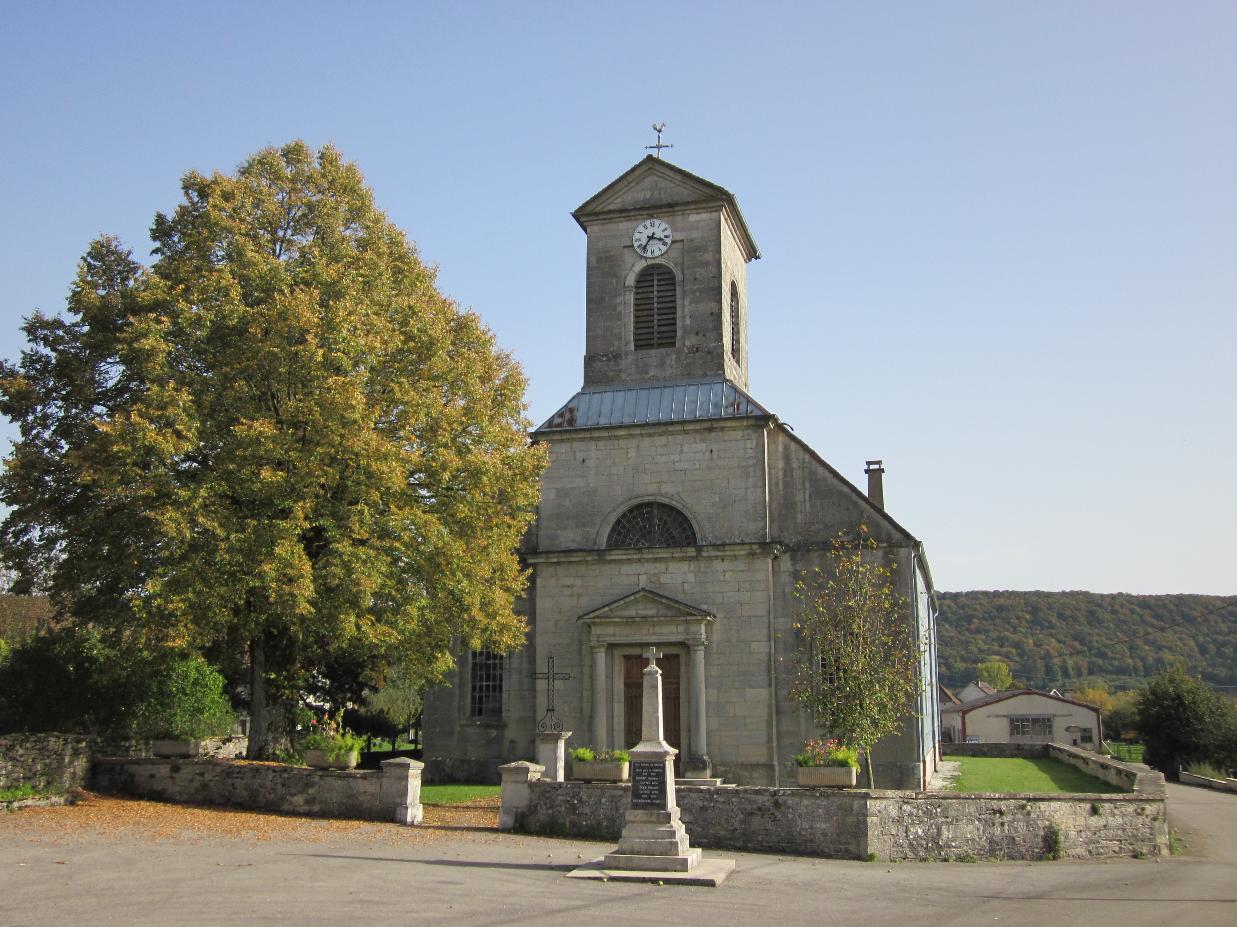 église de Besain Jura